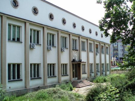 Аутор: Душан Ј. Басић }